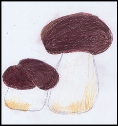 Dibuix boletus pinicola